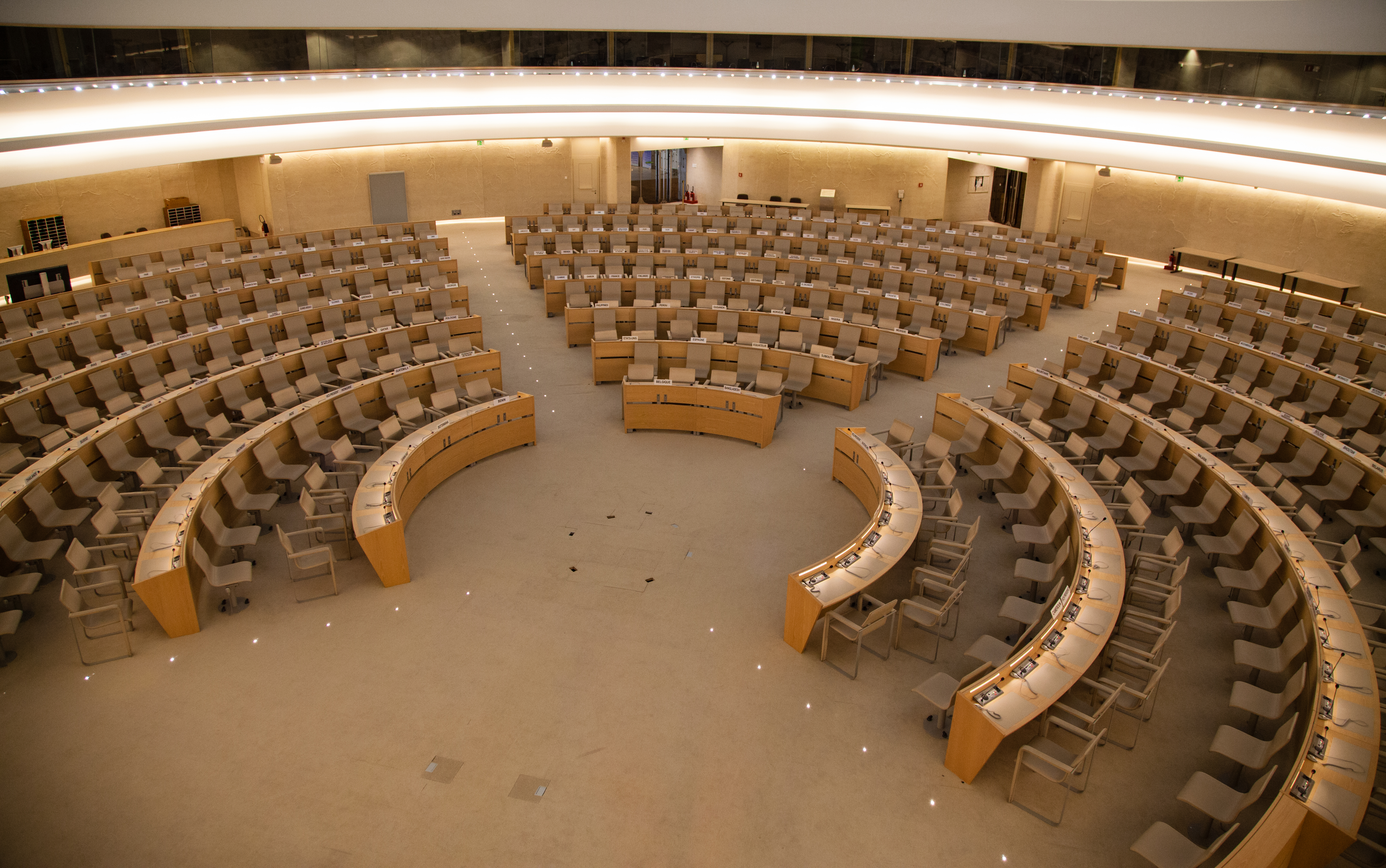 Vue sur la salle des droits de l'homme et de l'alliance des civilisations